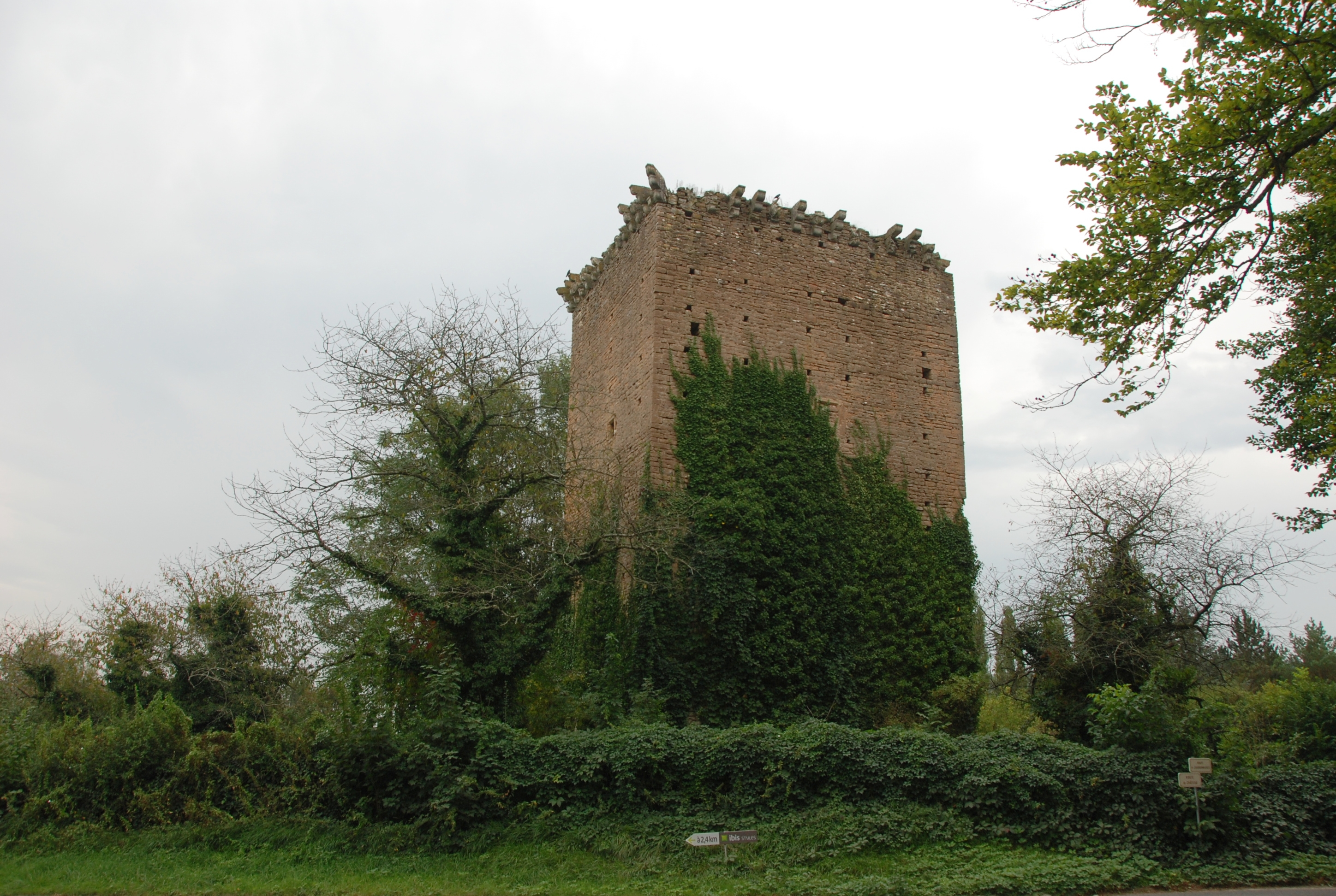 Donjon de La Salle, (Classé, 1991) .